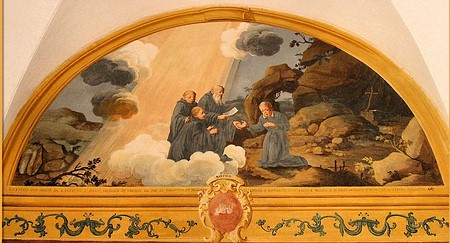 eremo di grottafucile